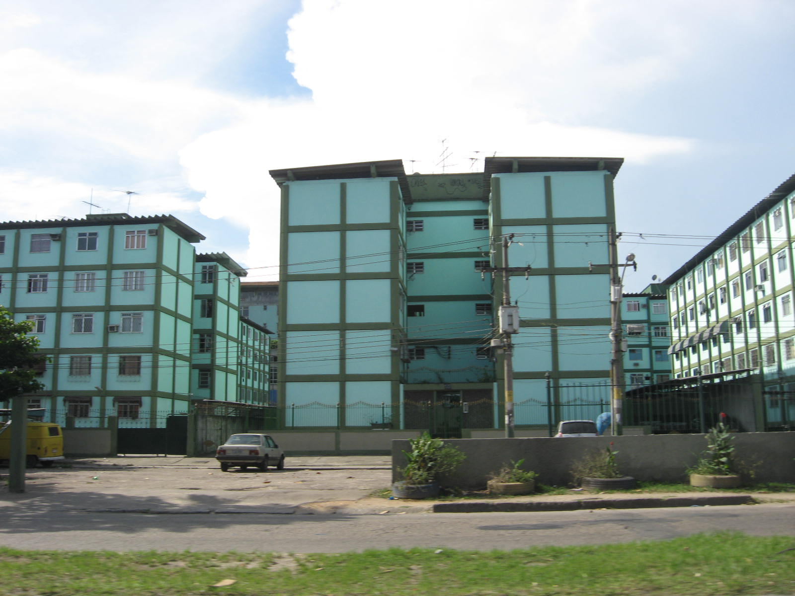 Vista de Fazenda Botafogo, no Rio de Janeiro.